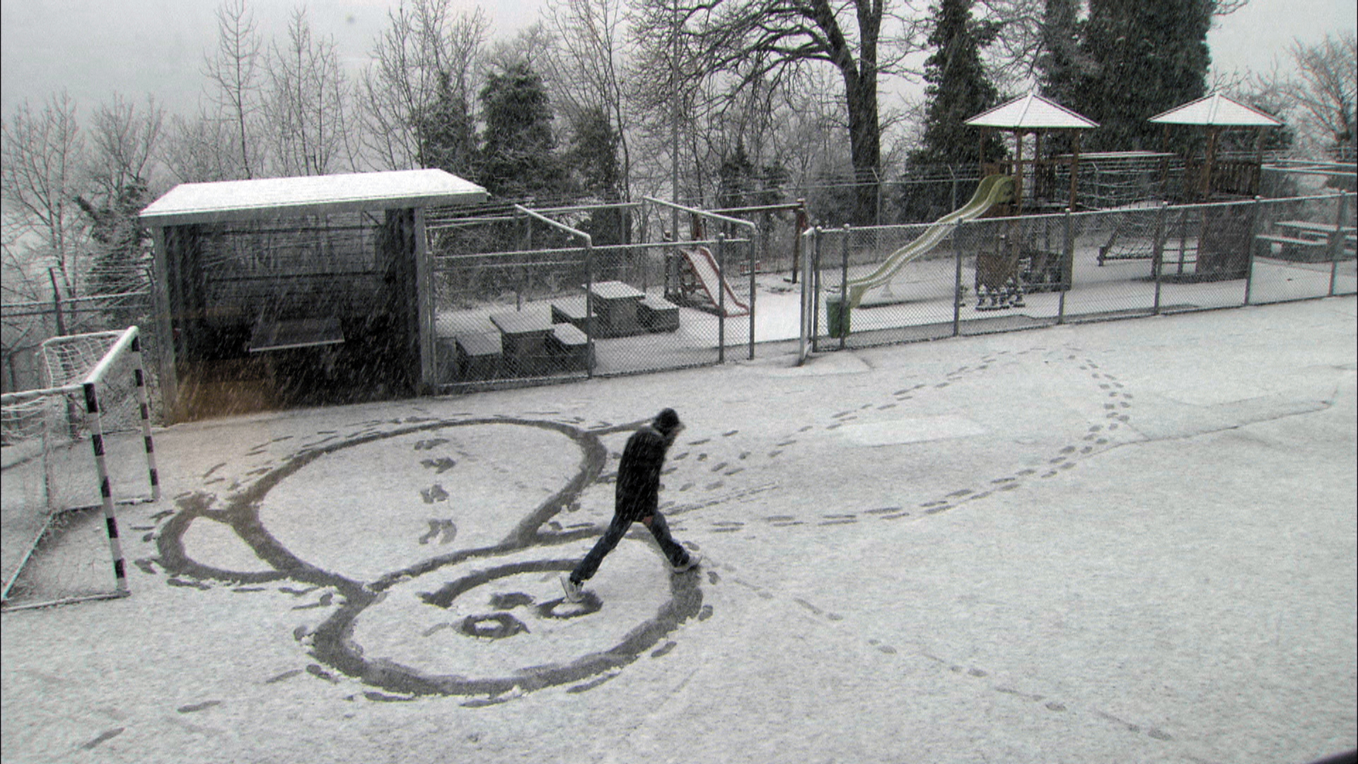 Dans la cour du centre d’enregistrement et de procédure pour requérant d’asile de Vallorbe. Image tirée du film « La forteresse » de Fernand Melgar